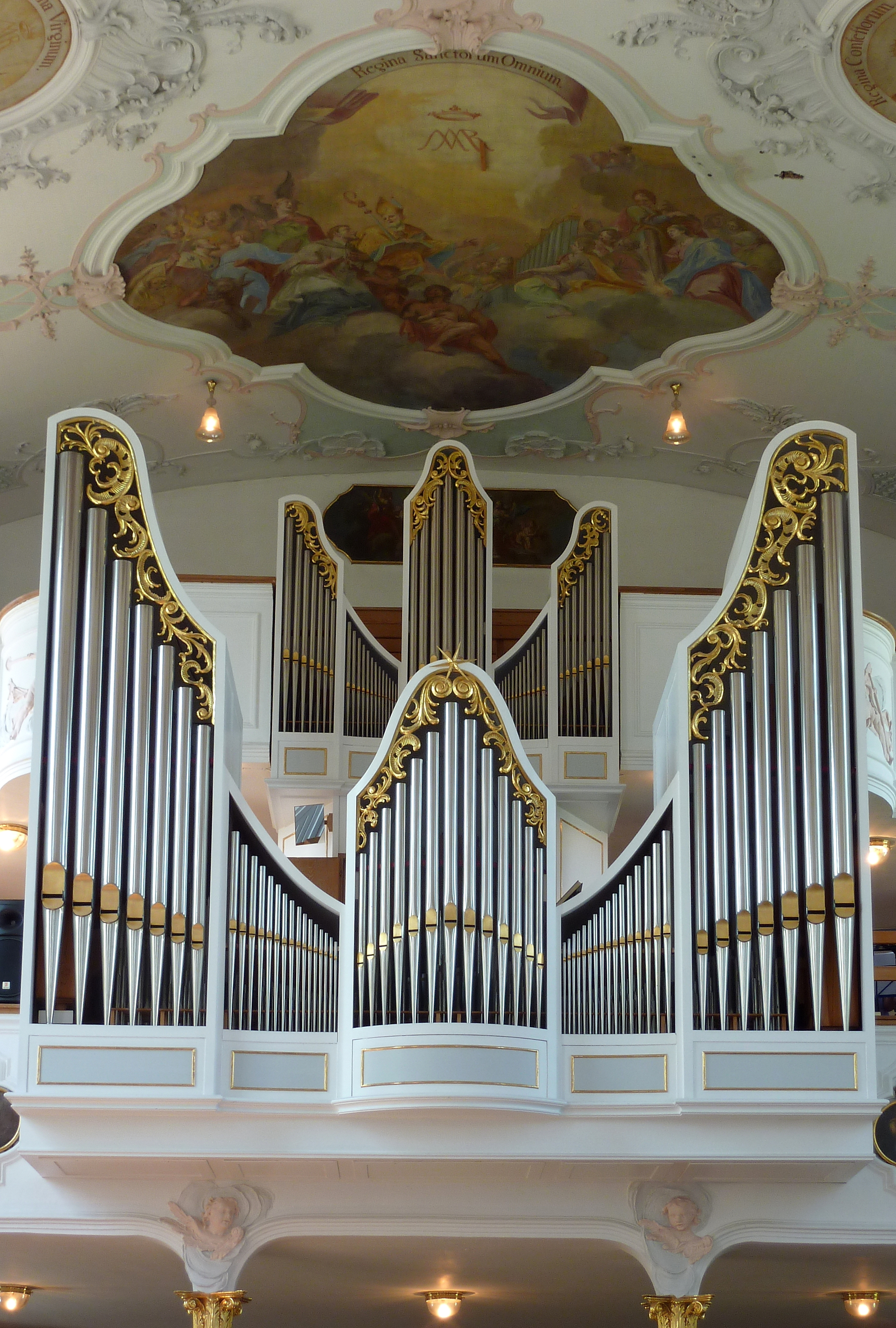 Katholische Pfarrkirche St. Georg in Westendorf, einer Gemeinde im Landkreis Augsburg (Bayern), mechanische Schleifladenorgel von Hubert Sandtner 1969 eingebaut